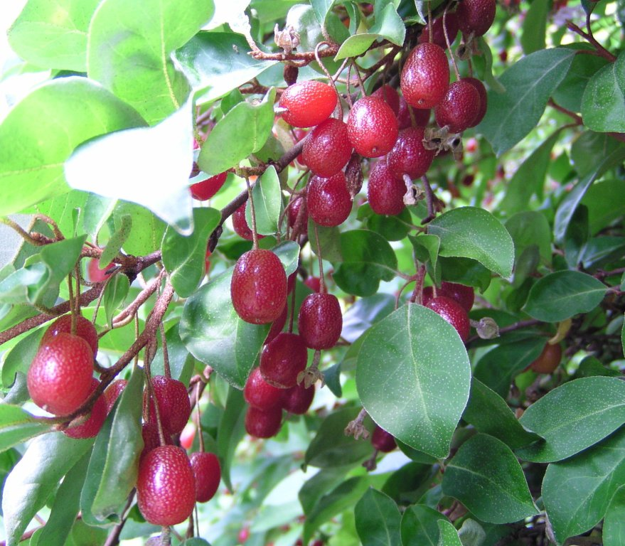 Reichblütige Ölweidenfrüchte